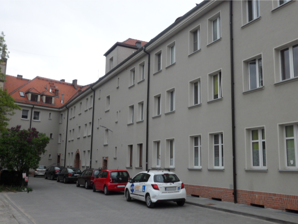 Budynek przy ul. Barbary 5A w Katowicach. Dom rodzinny Ernesta Wilimowskiego (Źródło info: forumniebiescy.pl Forum kibiców Ruchu Chorzów: Ernest Wilimowski - Strona 7 / Dziennik Zachodni Schläsch: Doas Familienhaus vu Ernst Willimowski ei Kattowitz. Ślůnski: Familijny dům Wilimowskiego we Katowicach.